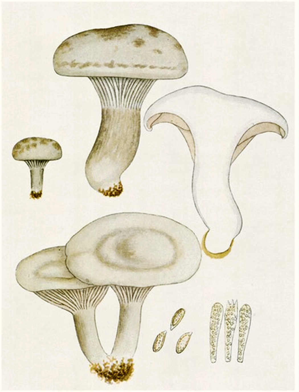 Giacomo Bresadola: Clitopilus prunulus (Scop., 1772) P. Kumm. (1871)